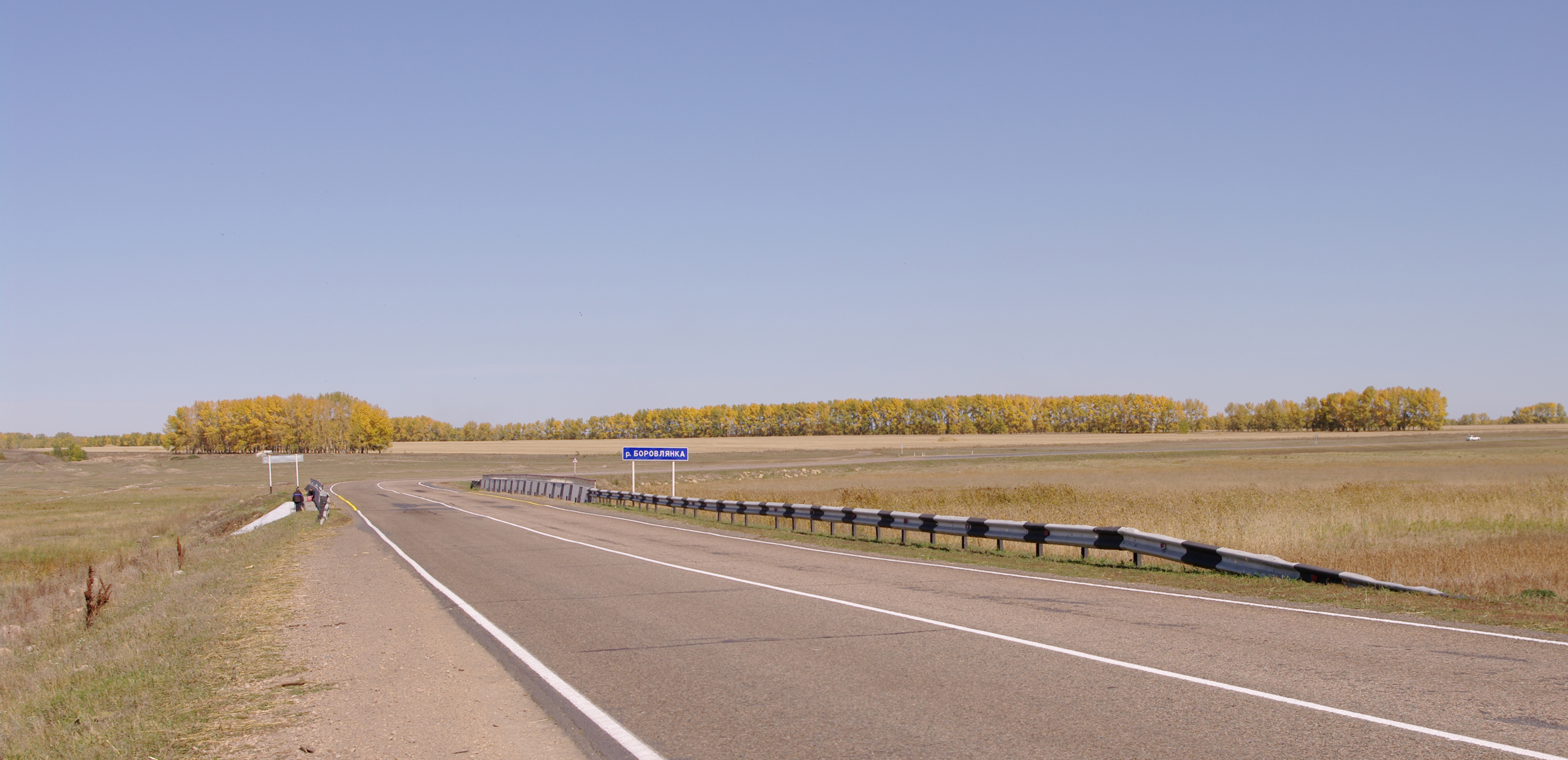 Мост через Боровлянку близ деревни Клочки, Ребрихинский район, Алтайский край, Россия.